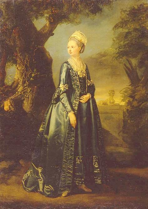 Портрет Великой княгини Натальи Алексеевны. П.-Э. Фальконе, 1773